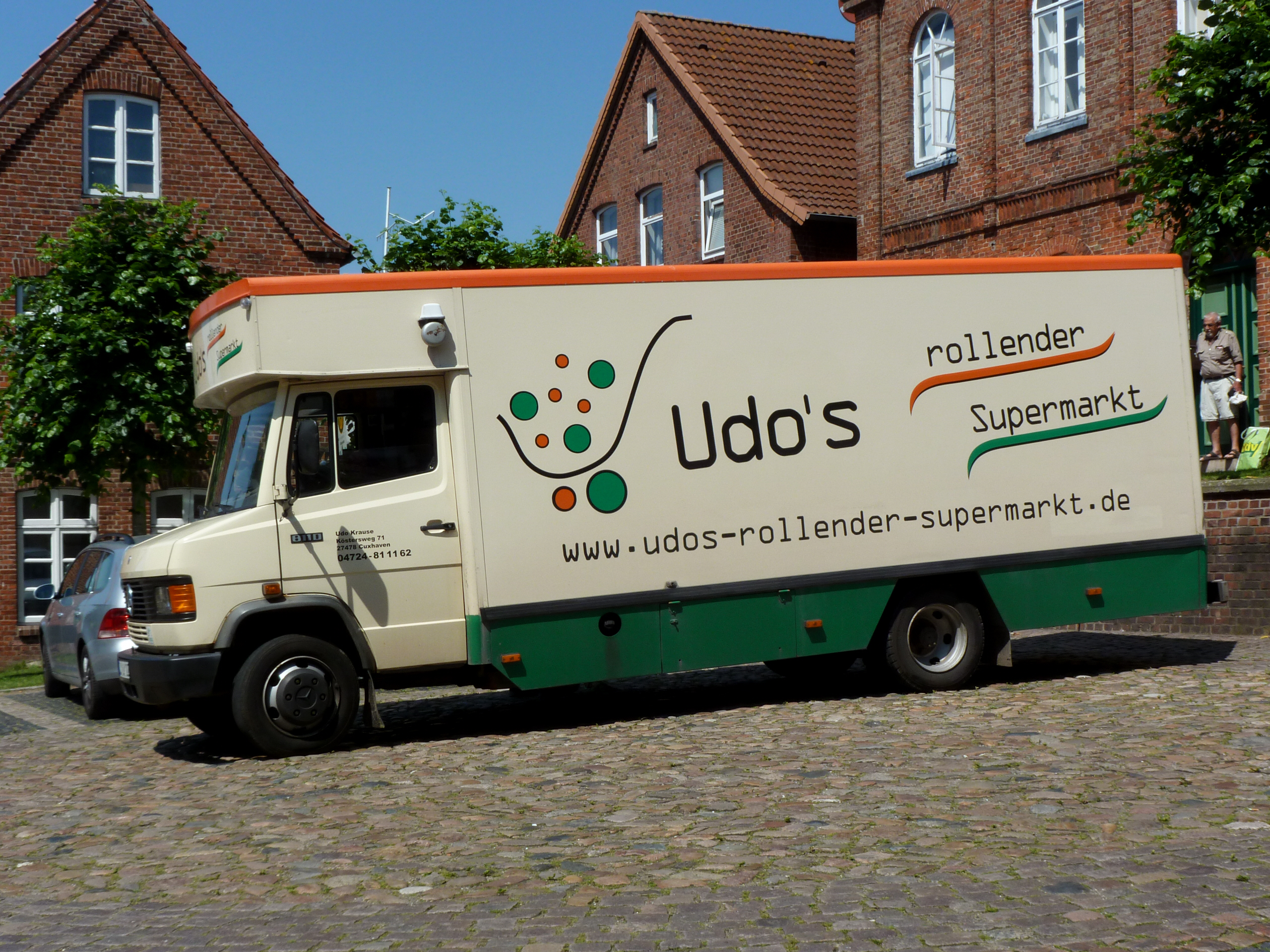 Ein rollender Supermarkt auf dem Marktplatz von Neuhaus (Oste).